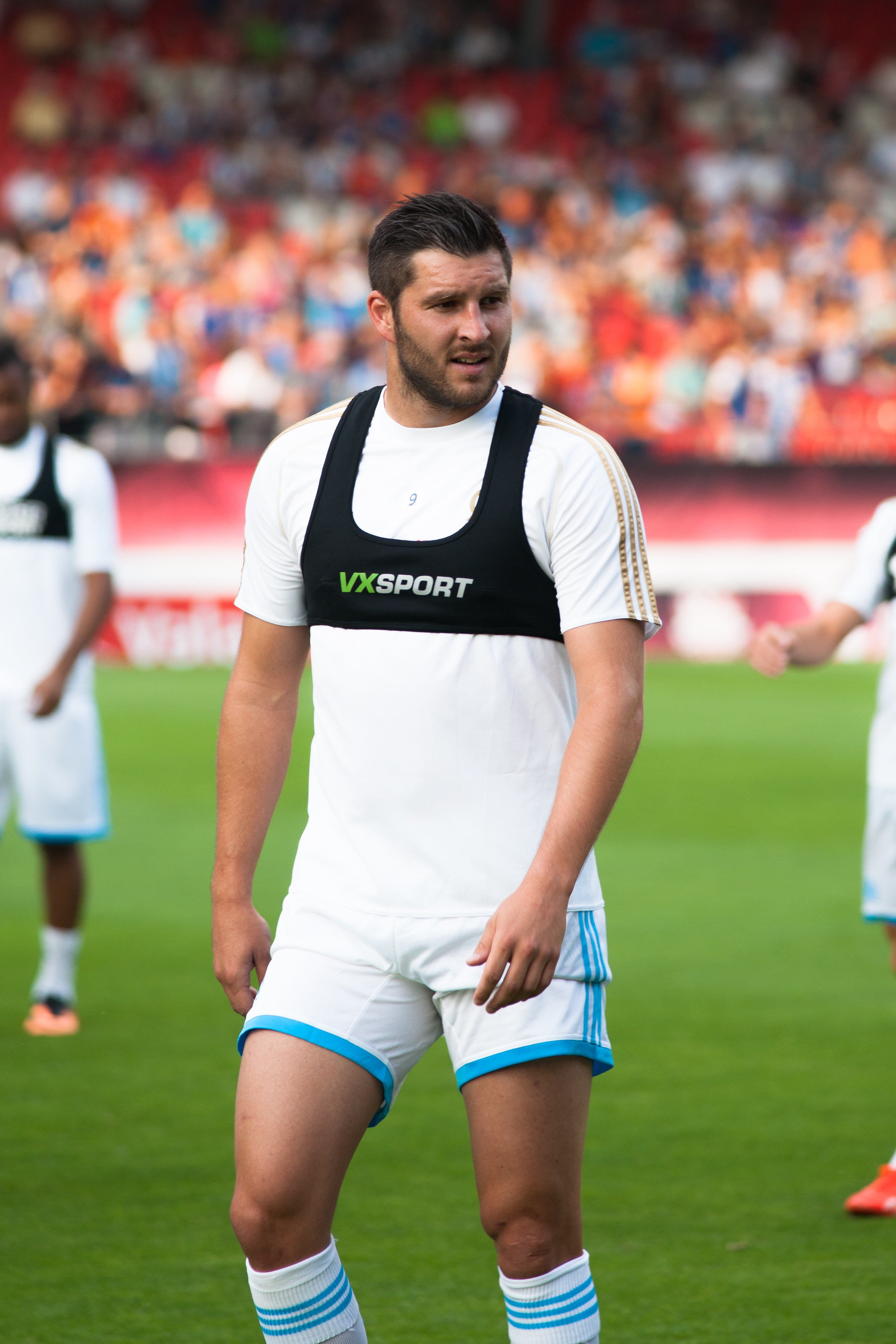 OM - FC Porto - Valais Cup 2013 - André-Pierre Gignac